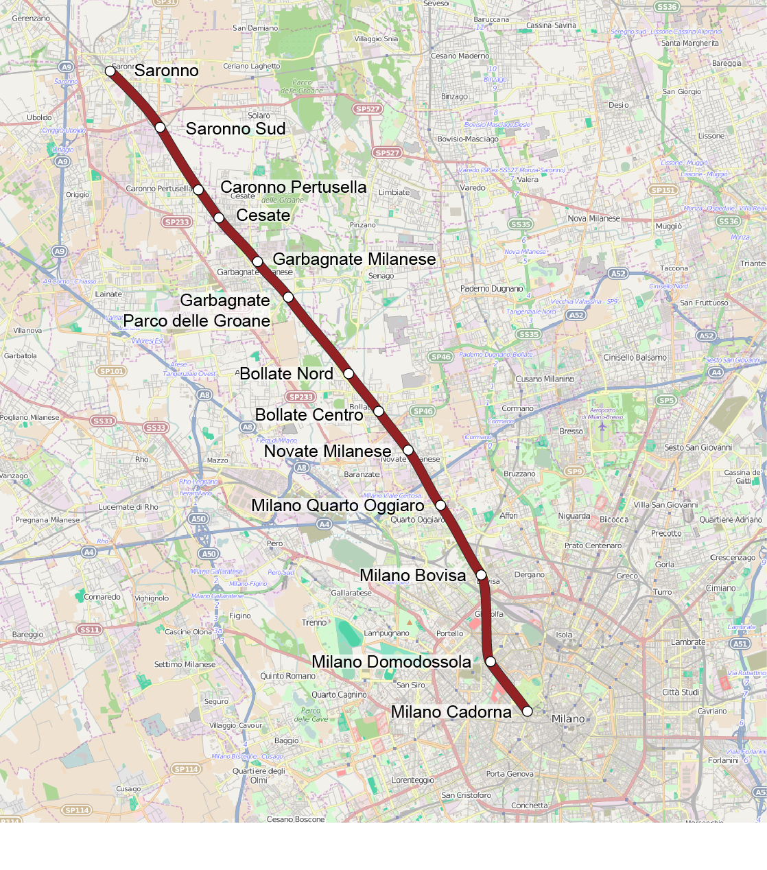 Mappa della linea S3 del servizio ferroviario suburbano di Milano